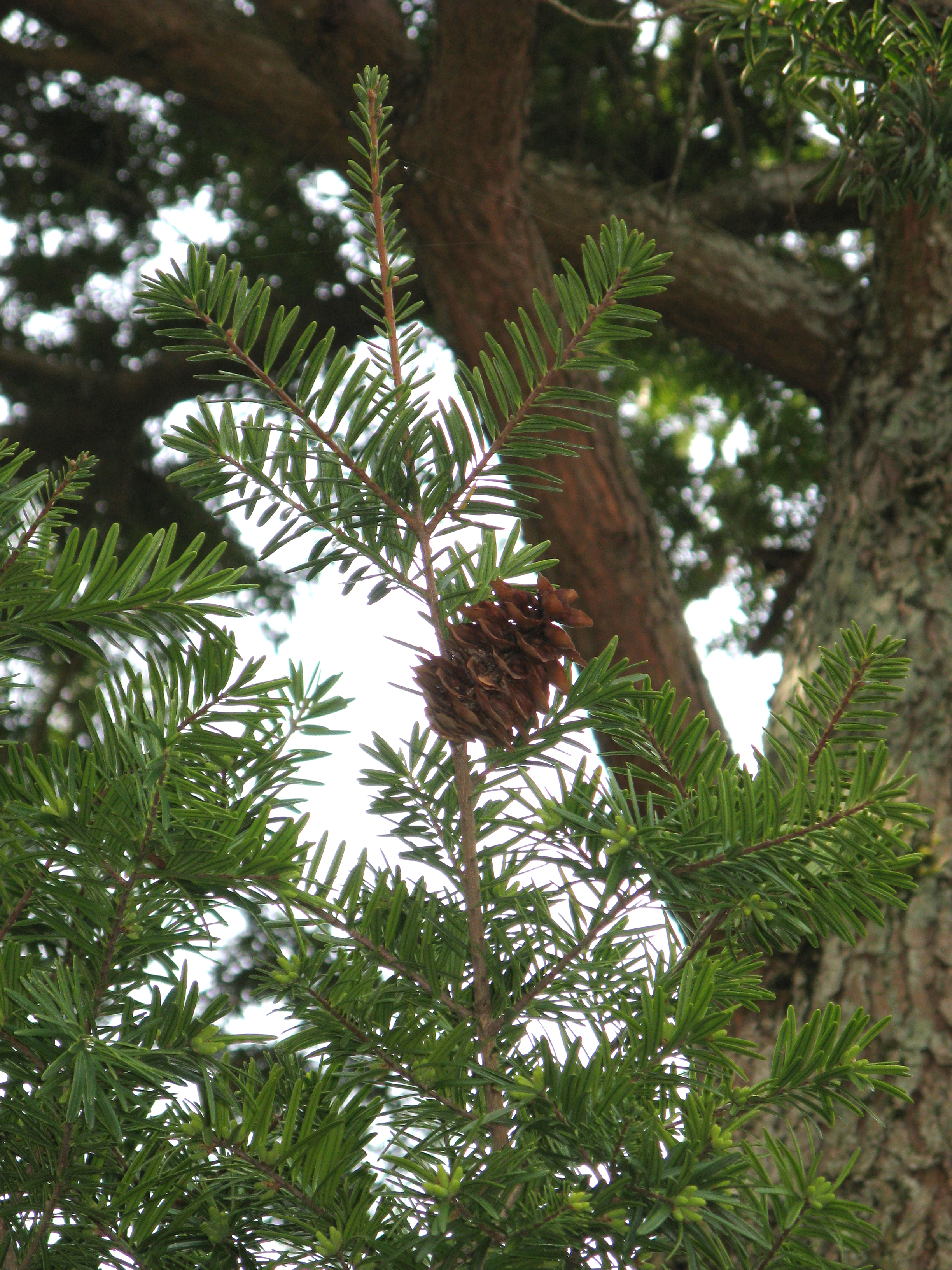 Scientific name Keteleeria davidiana